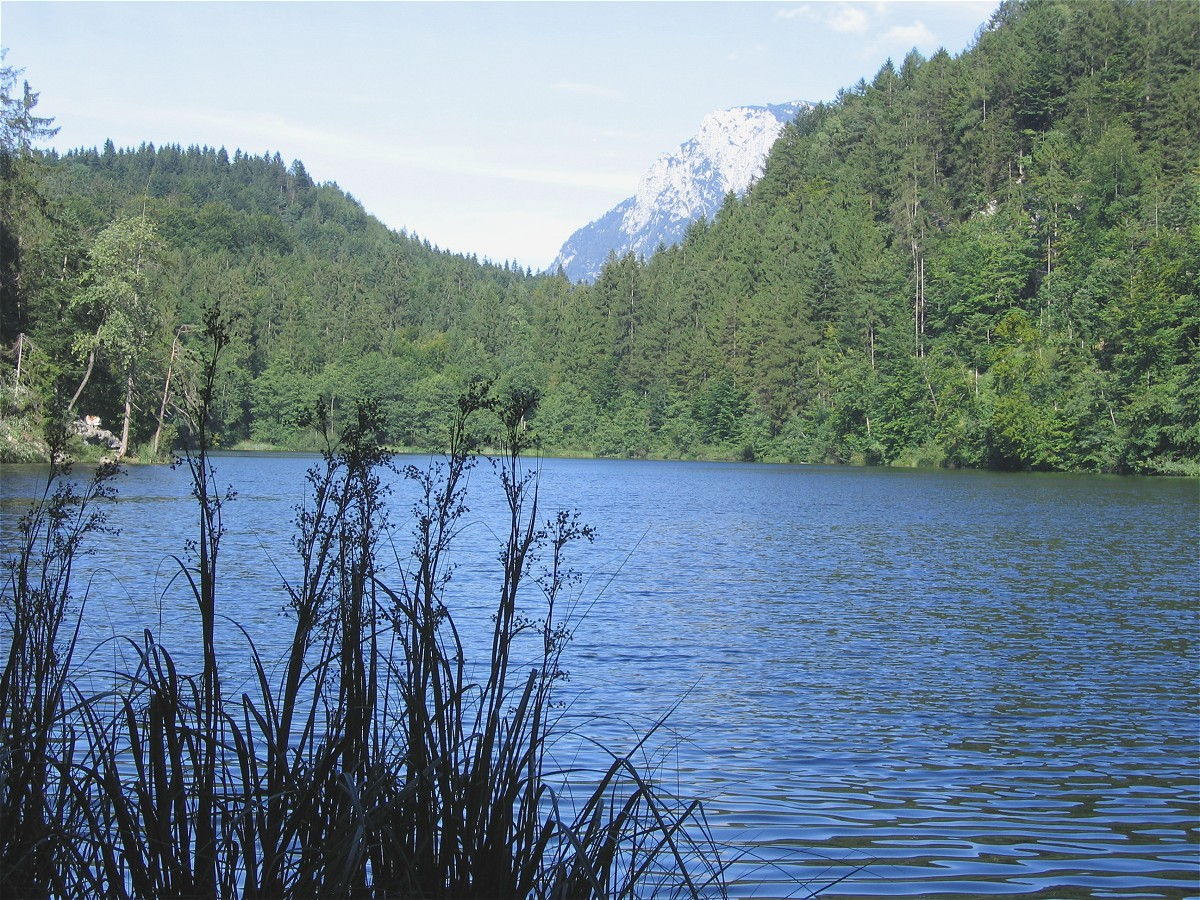 Längsee bei Kufstein, Tirol